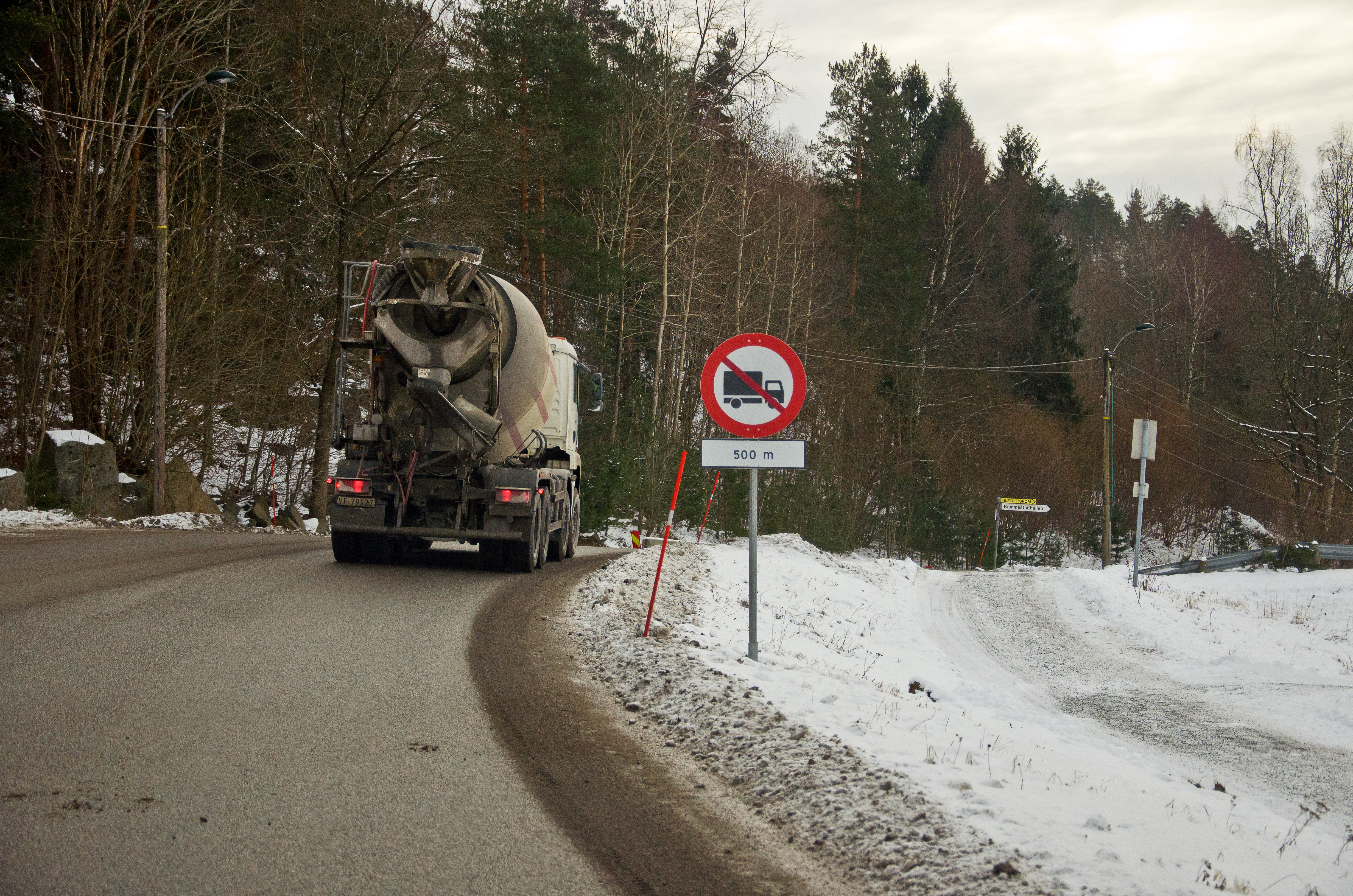 Vestfolds fylkesvei 162, Rauanveien i Larvik